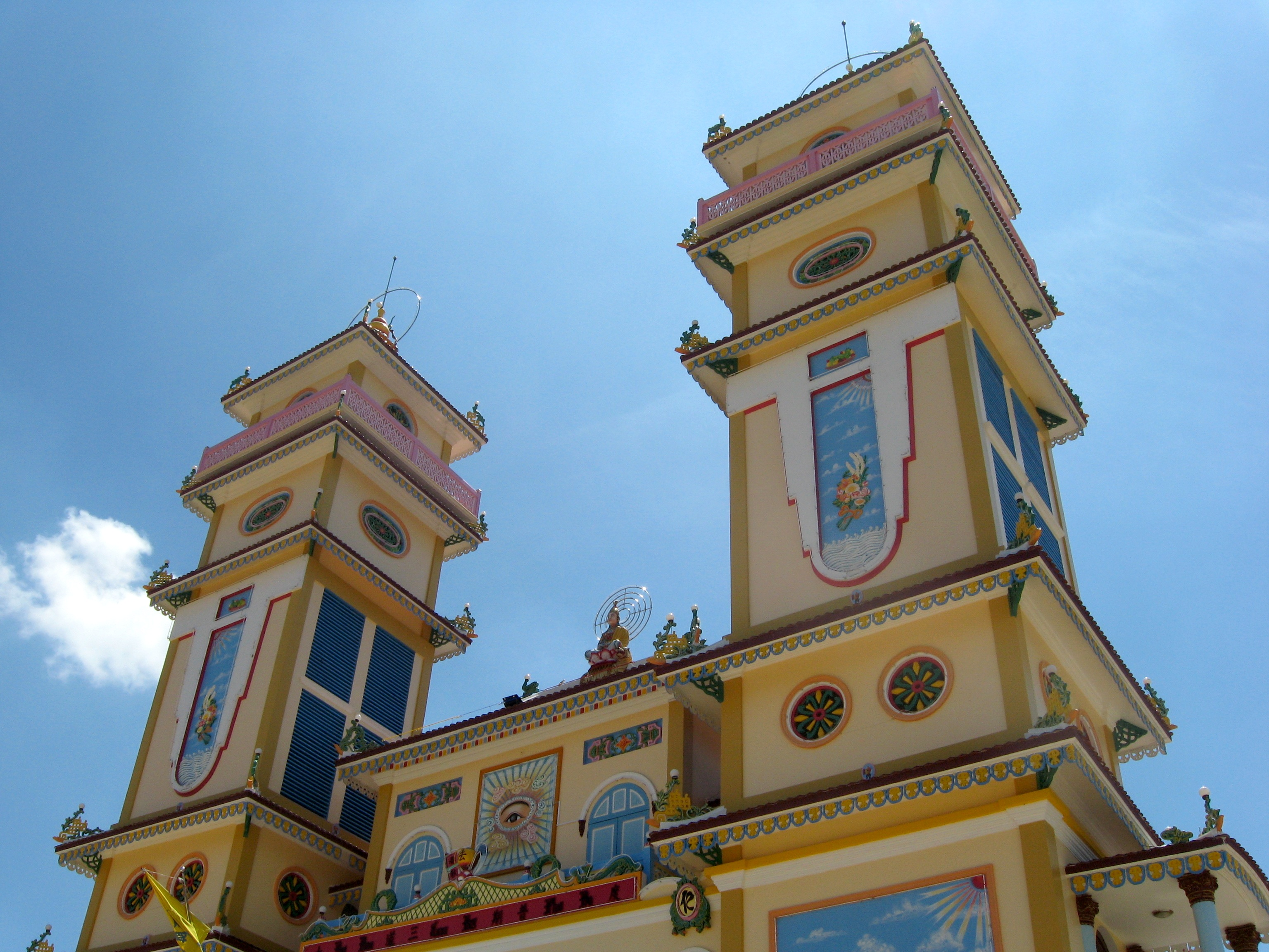 Thanh that Da Phuoc